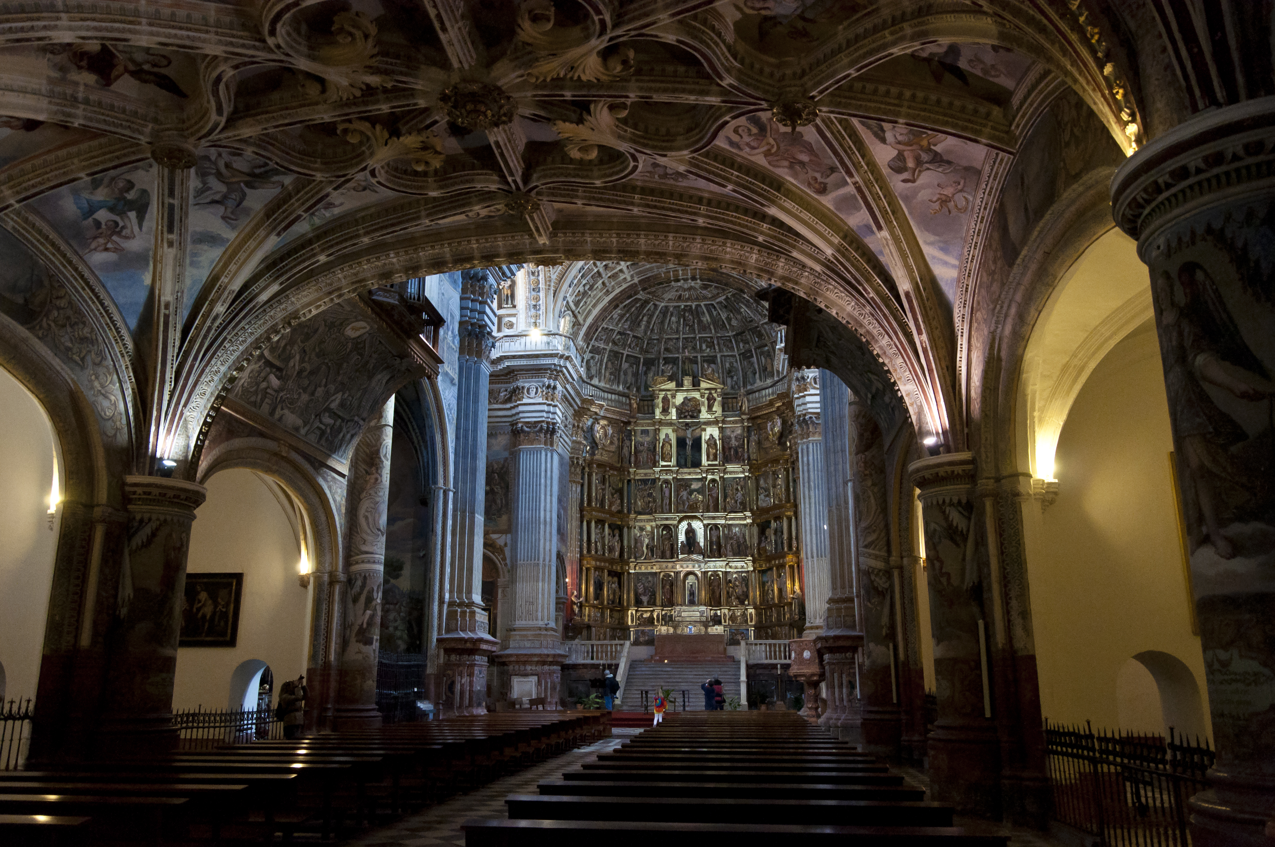 Interieur van de kloosterkerk van het klooster van Hiëronymus te Granada